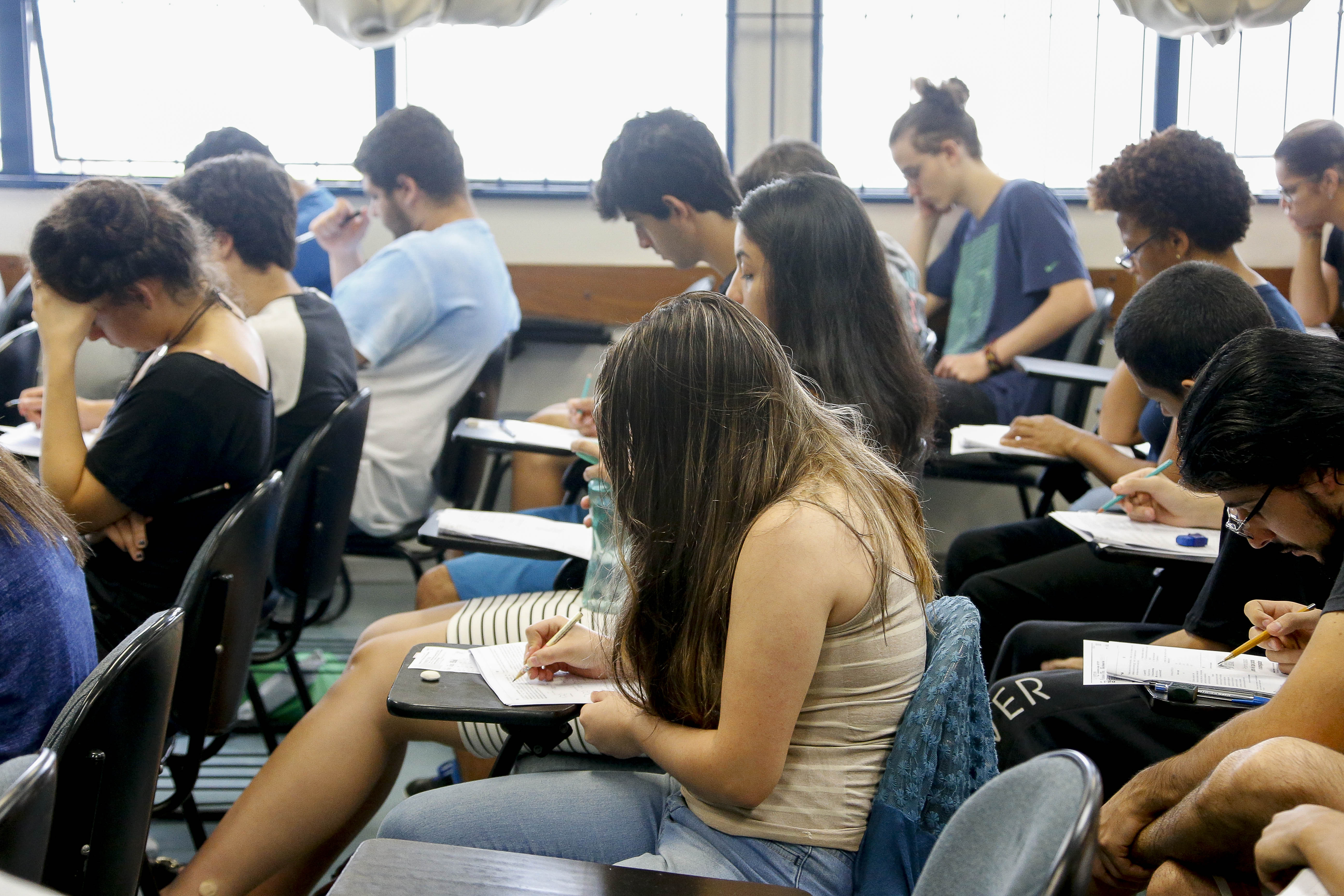 Português do Brasil: Primeira fase do Vestibular da Fuvest (Fundação Universitária para o Vestibular) 2017/18.